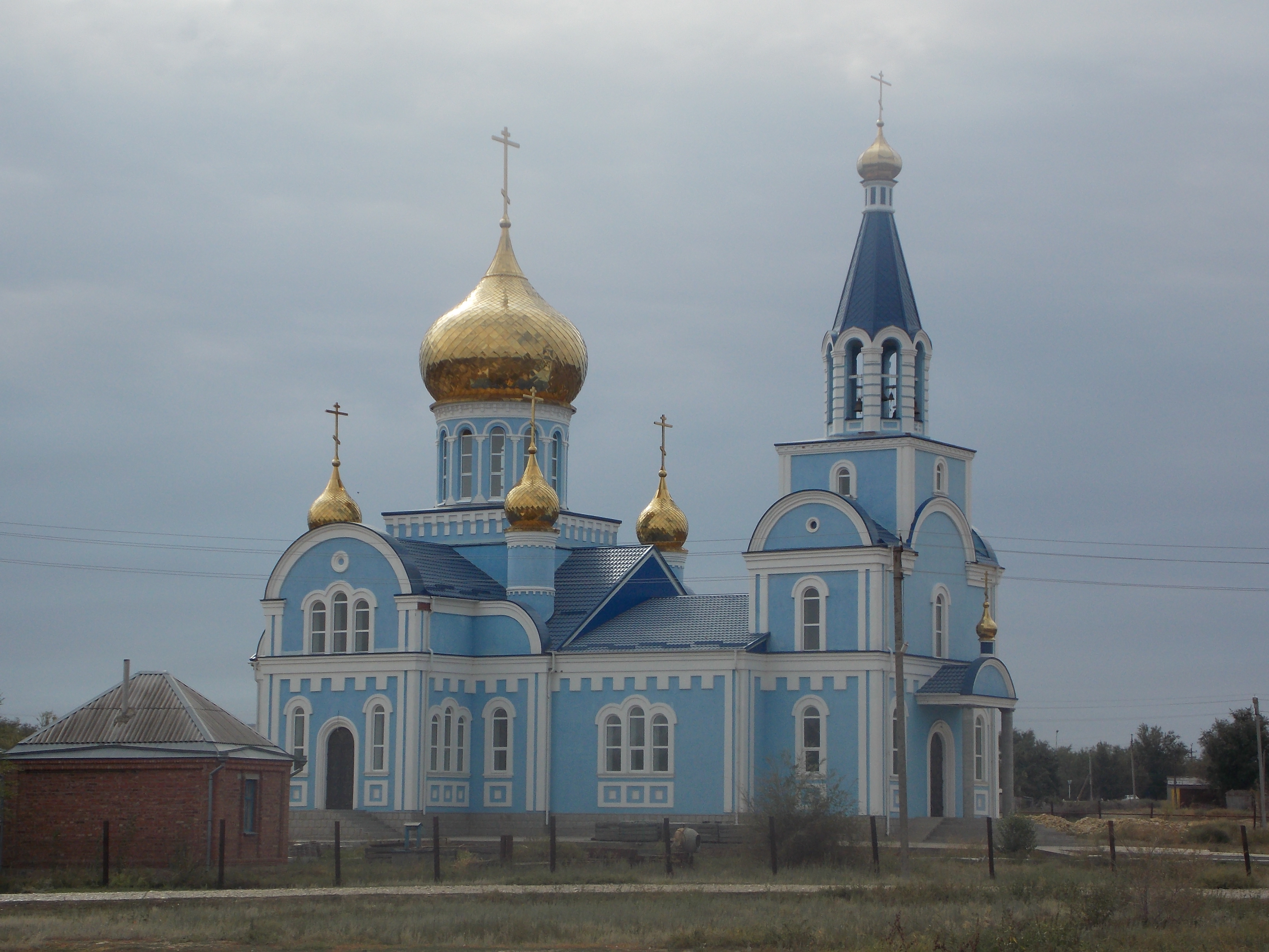 Церковь в селе Дивное, Ставропольский край